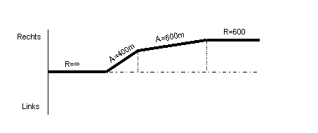 de=Krümmungsband einer Korbklotoide